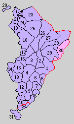 山口県豊浦郡の町村制時点の町村。